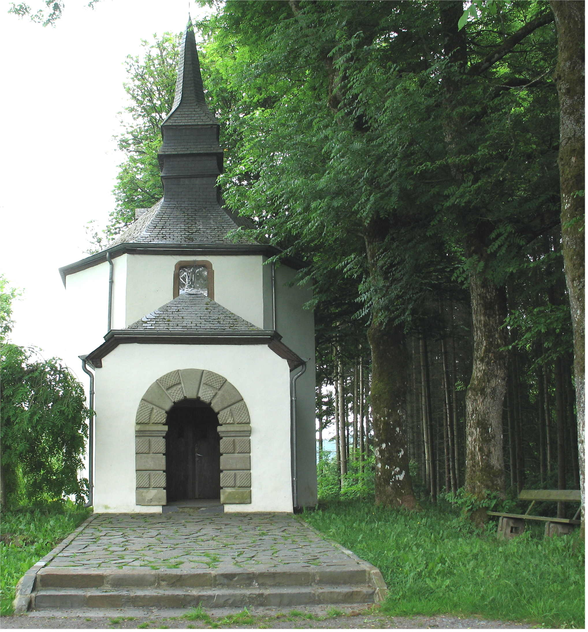 Sujet:D'Pirminuskapell vu Kauneref Source: Eege Foto User:Johnny Chicago Lizenz: GFDL